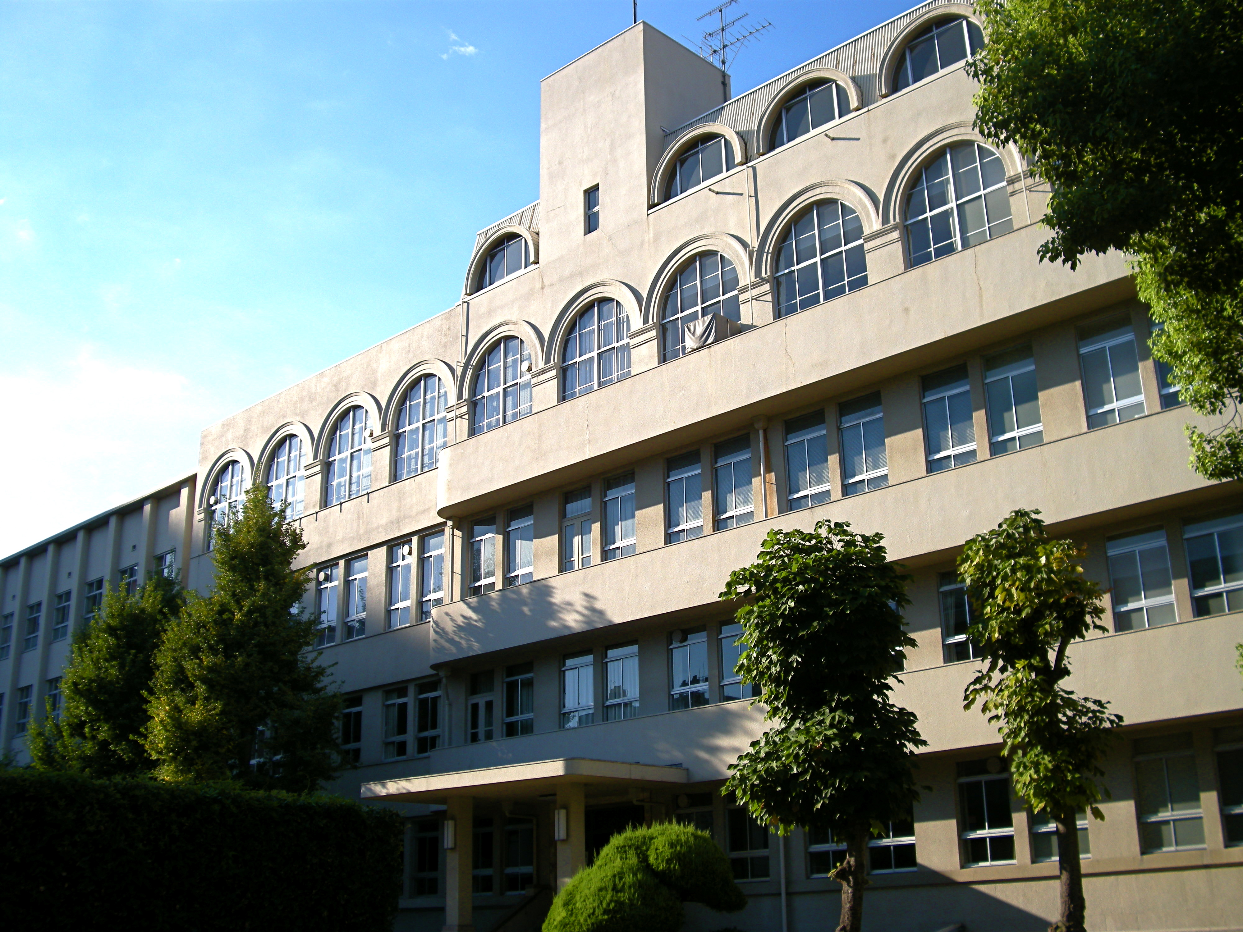 Kansai University (Tenroku Campus, Osaka, Japan)